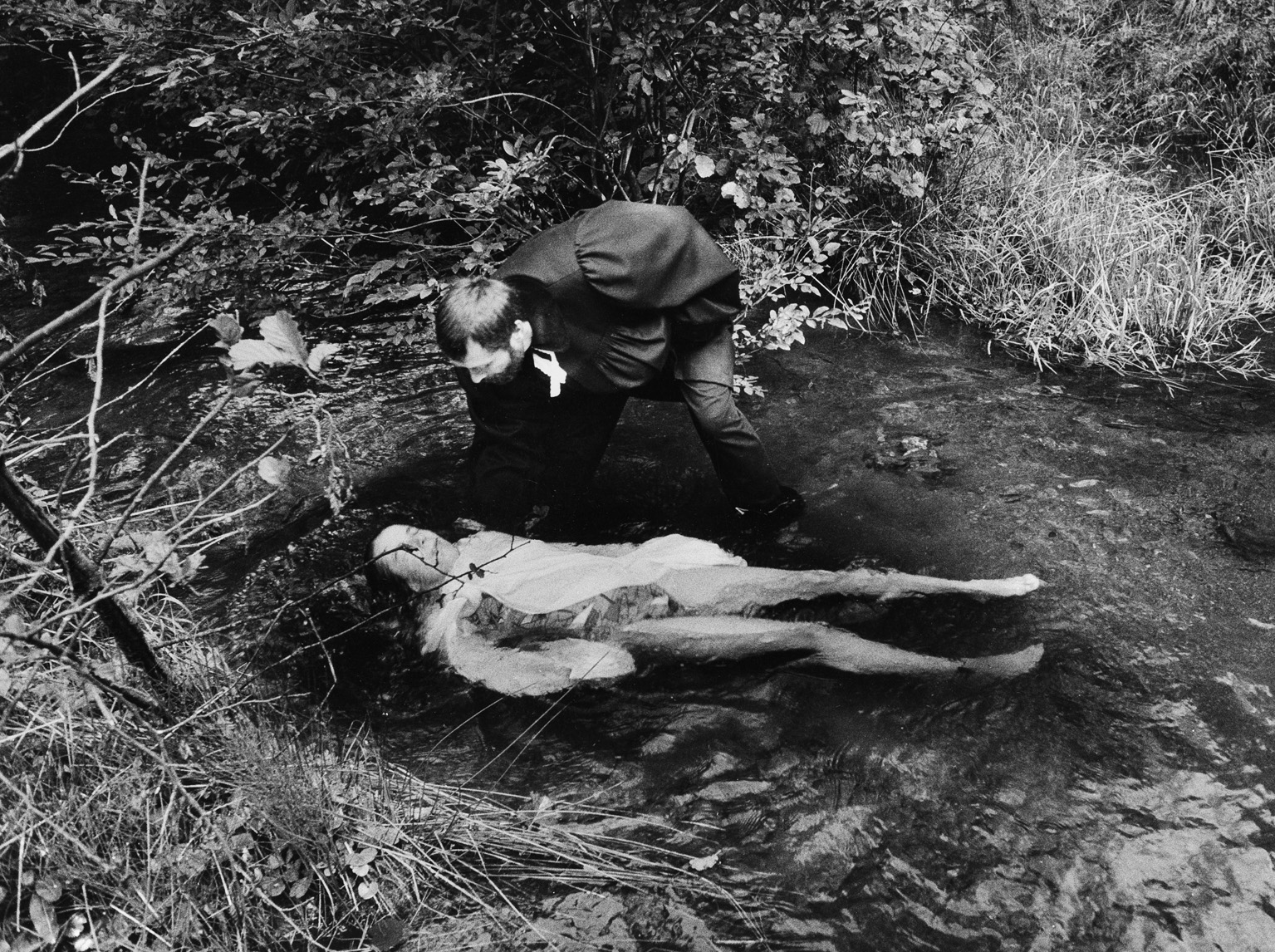 Jindřich Štreit´s archive